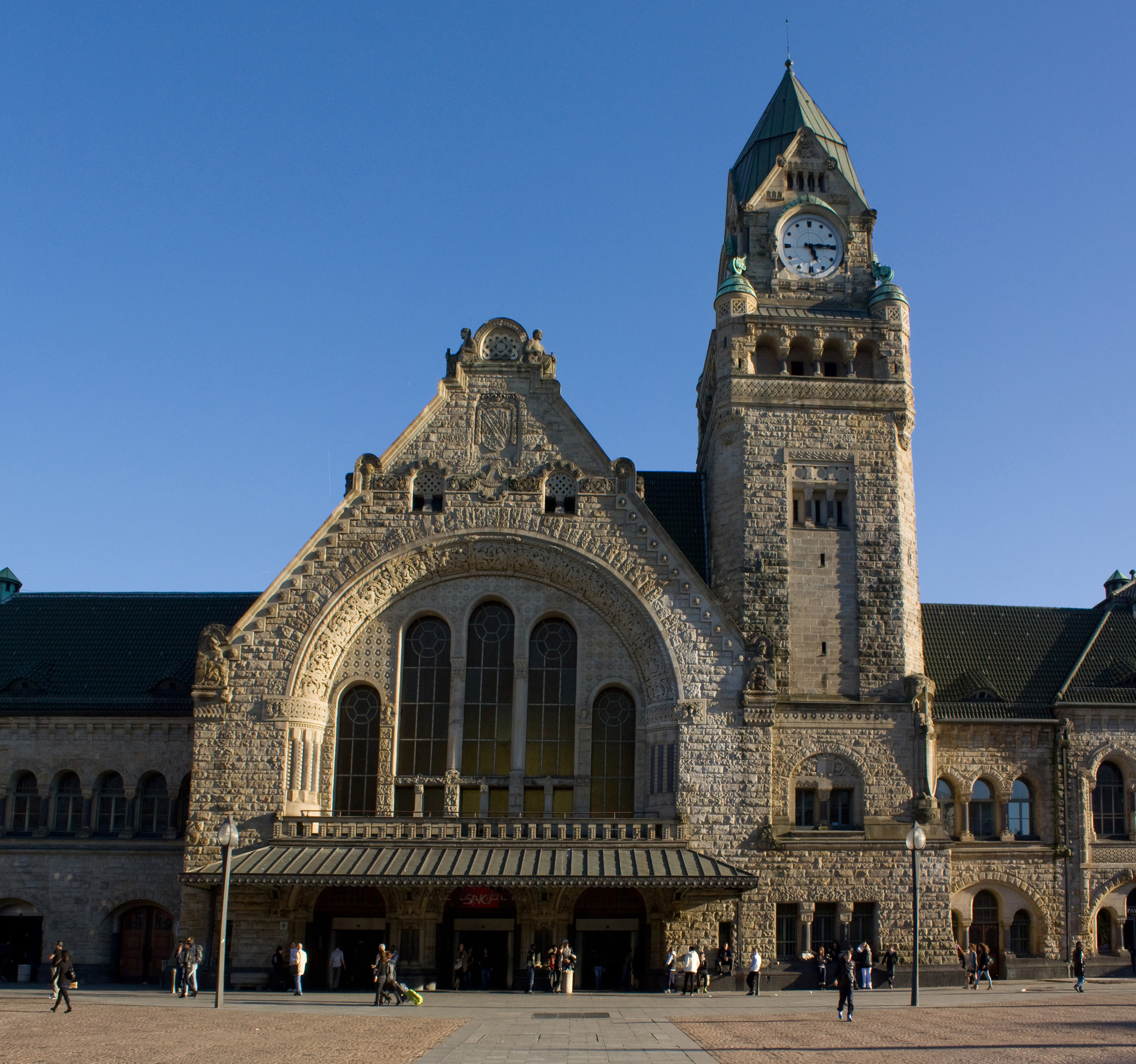 Gare de Metz-Ville .